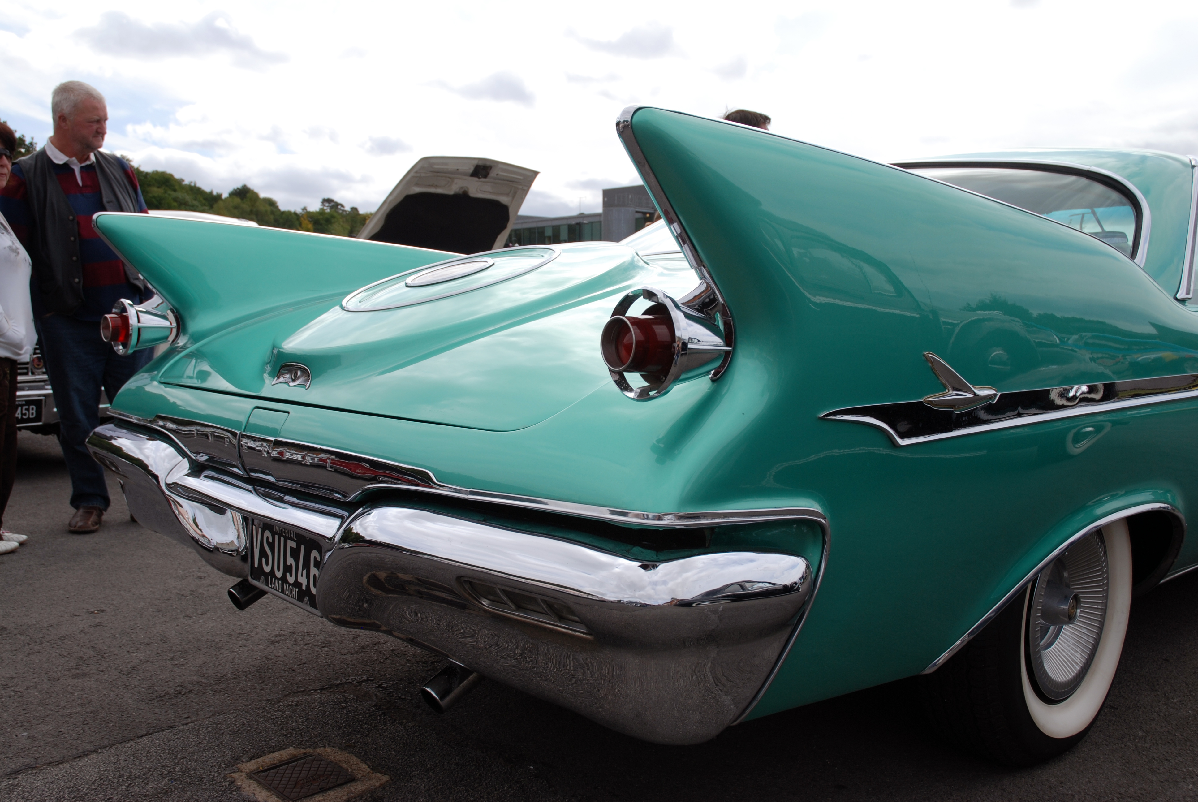 Brooklands,Sep 2009